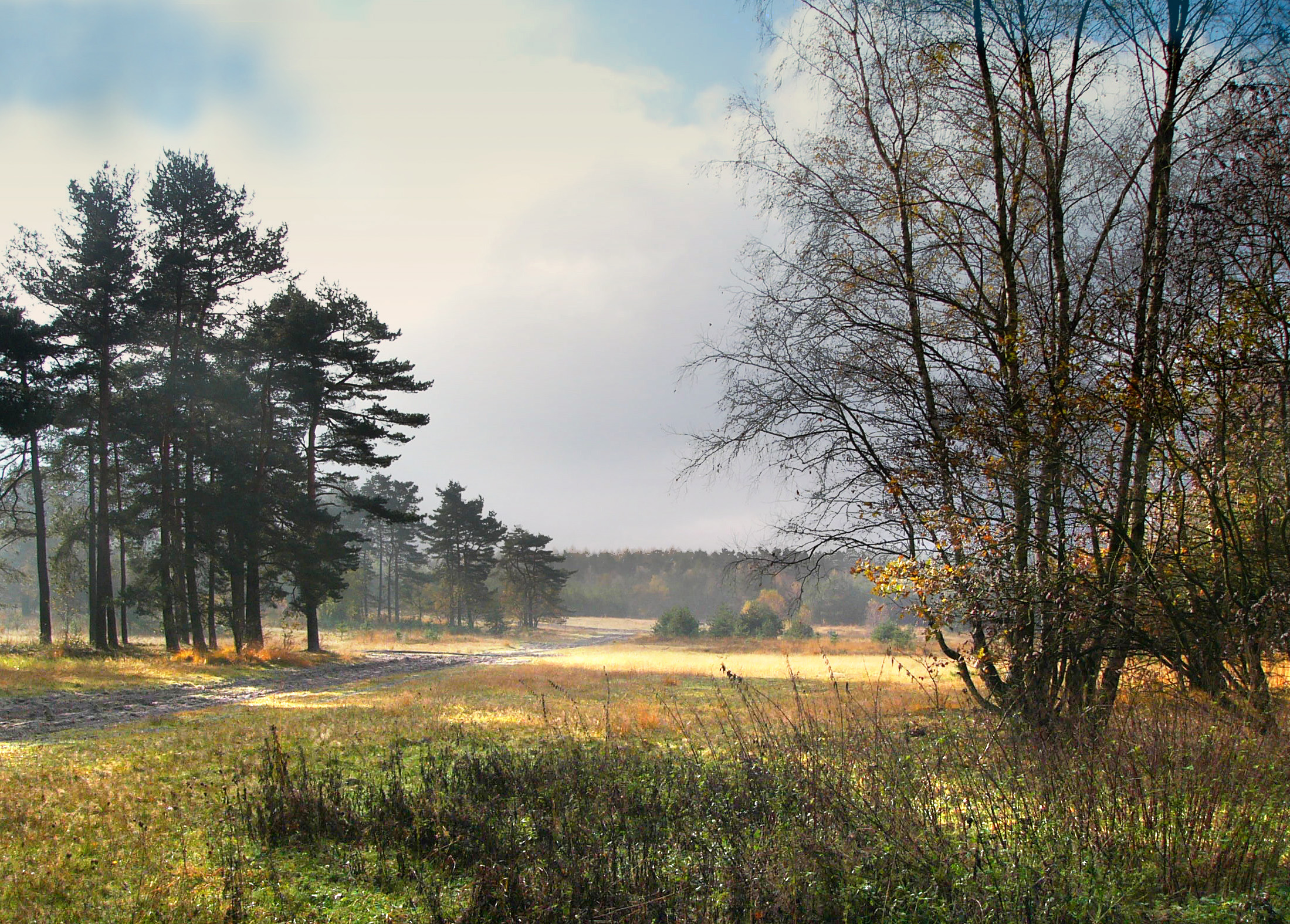 Sennelandschaft im Herbst, Deutschland